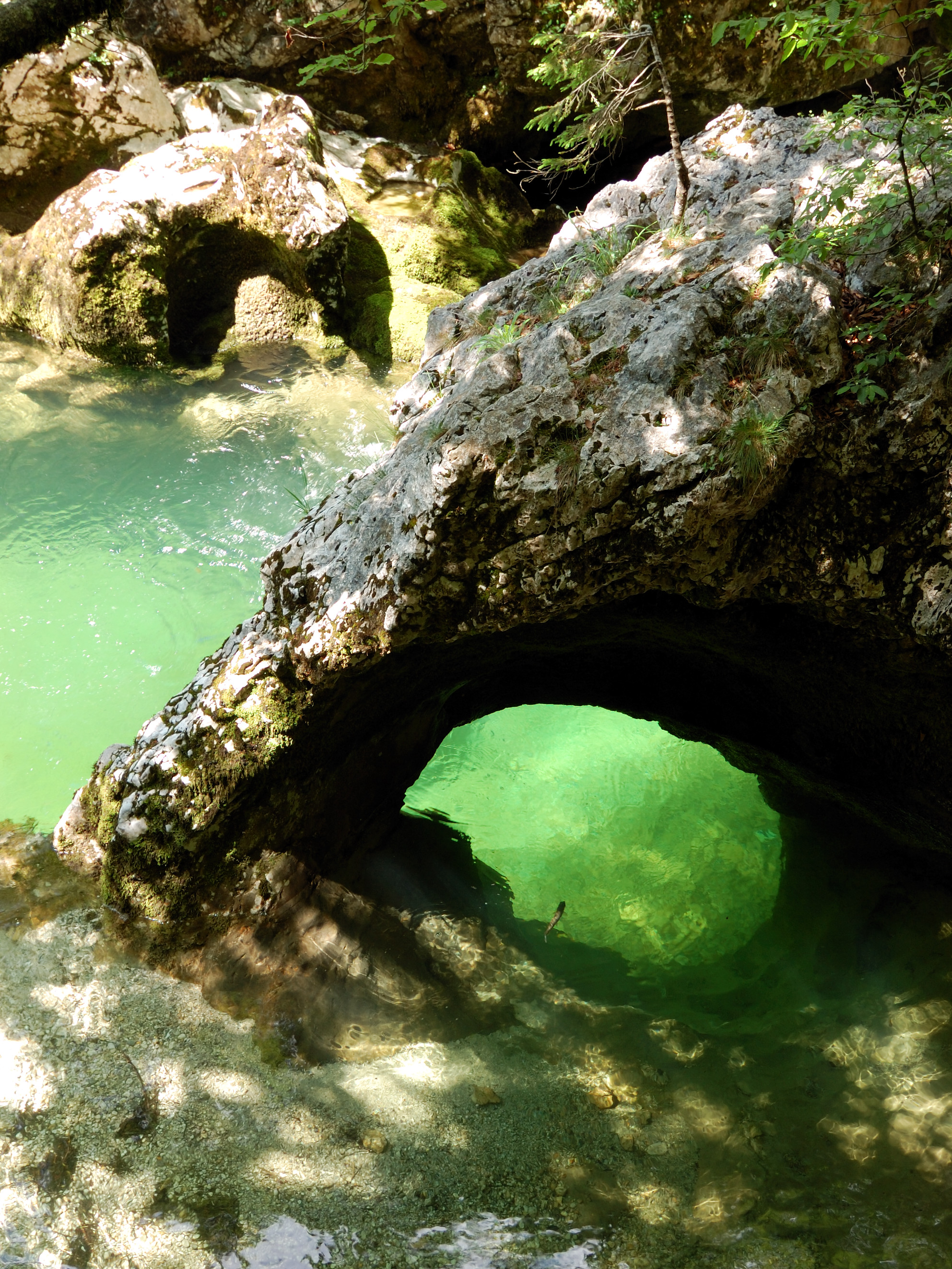 Near lake Bohinj, Slovenia [2007]